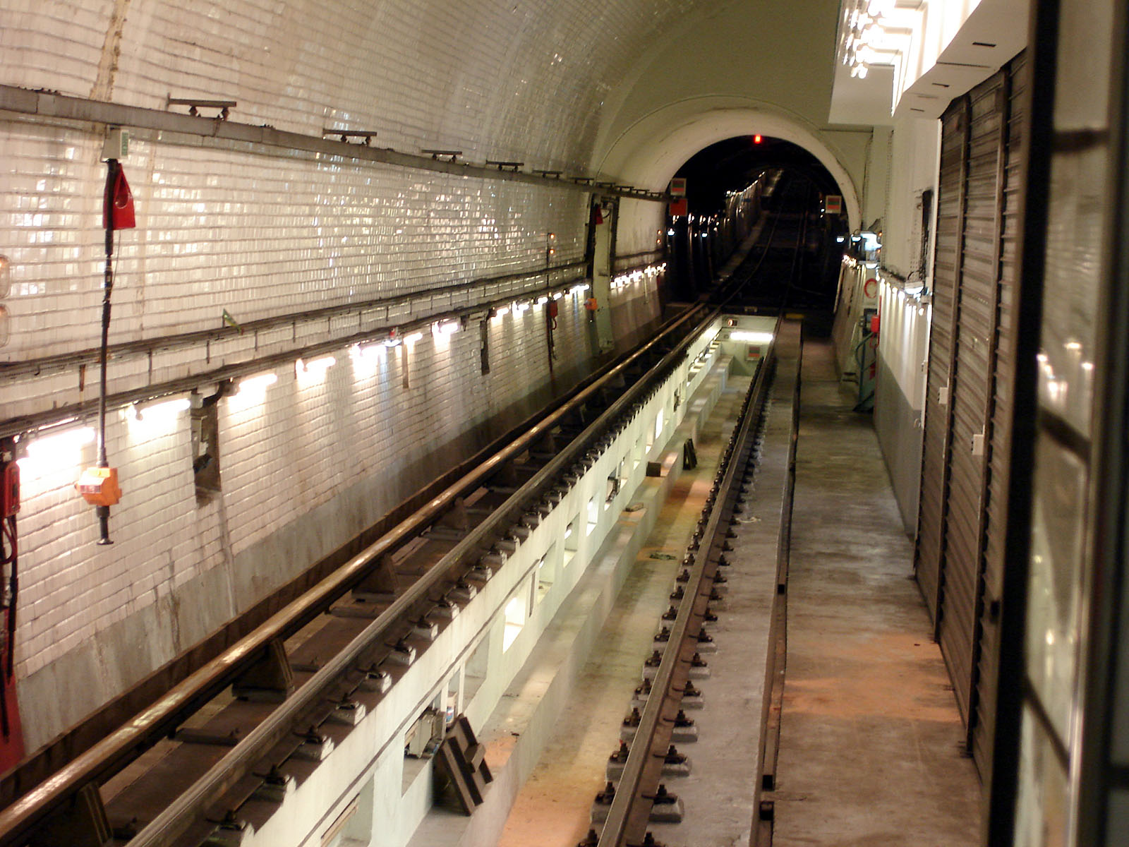 Station Pré-Saint-Gervais de la ligne 7 bis du métro de Paris, France.